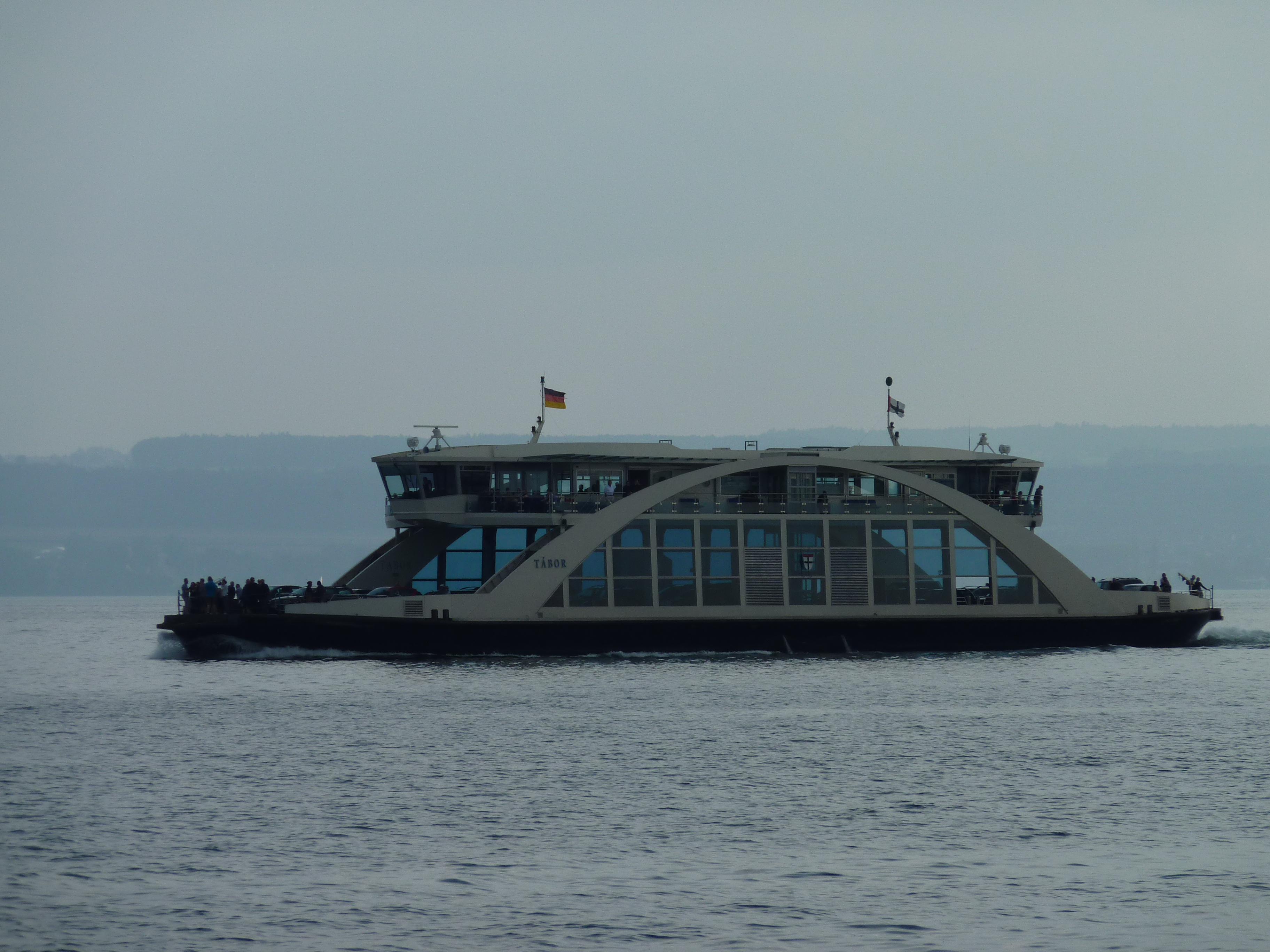 MF Tábor